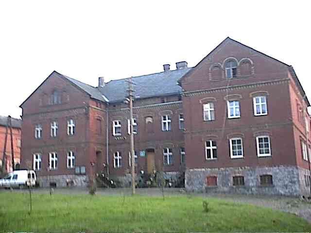 Budynek z 1880 roku w Bobrowie